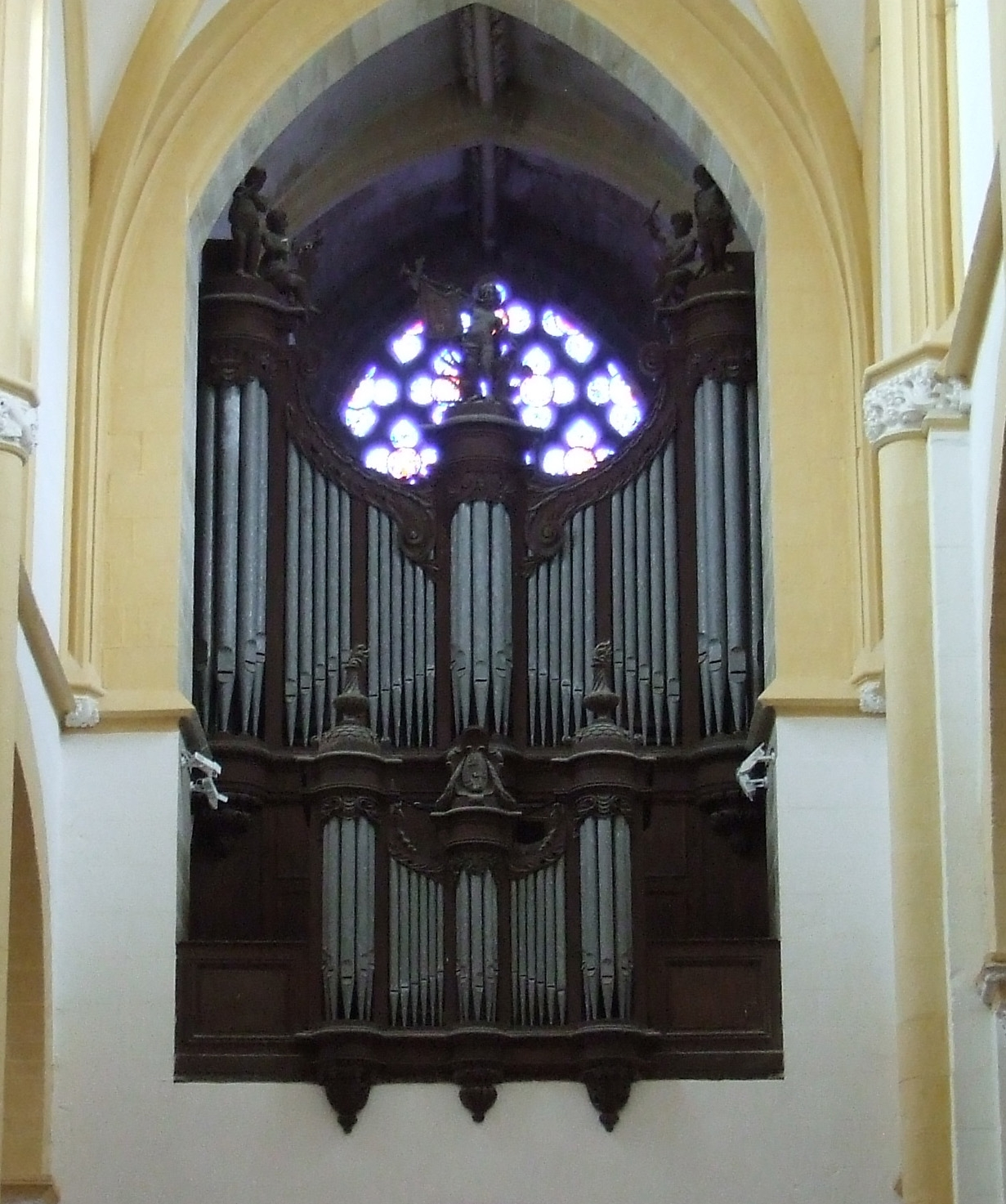 Orgue classé Monument historique construit par François Henri Clicquot (1783) pour Souvigny